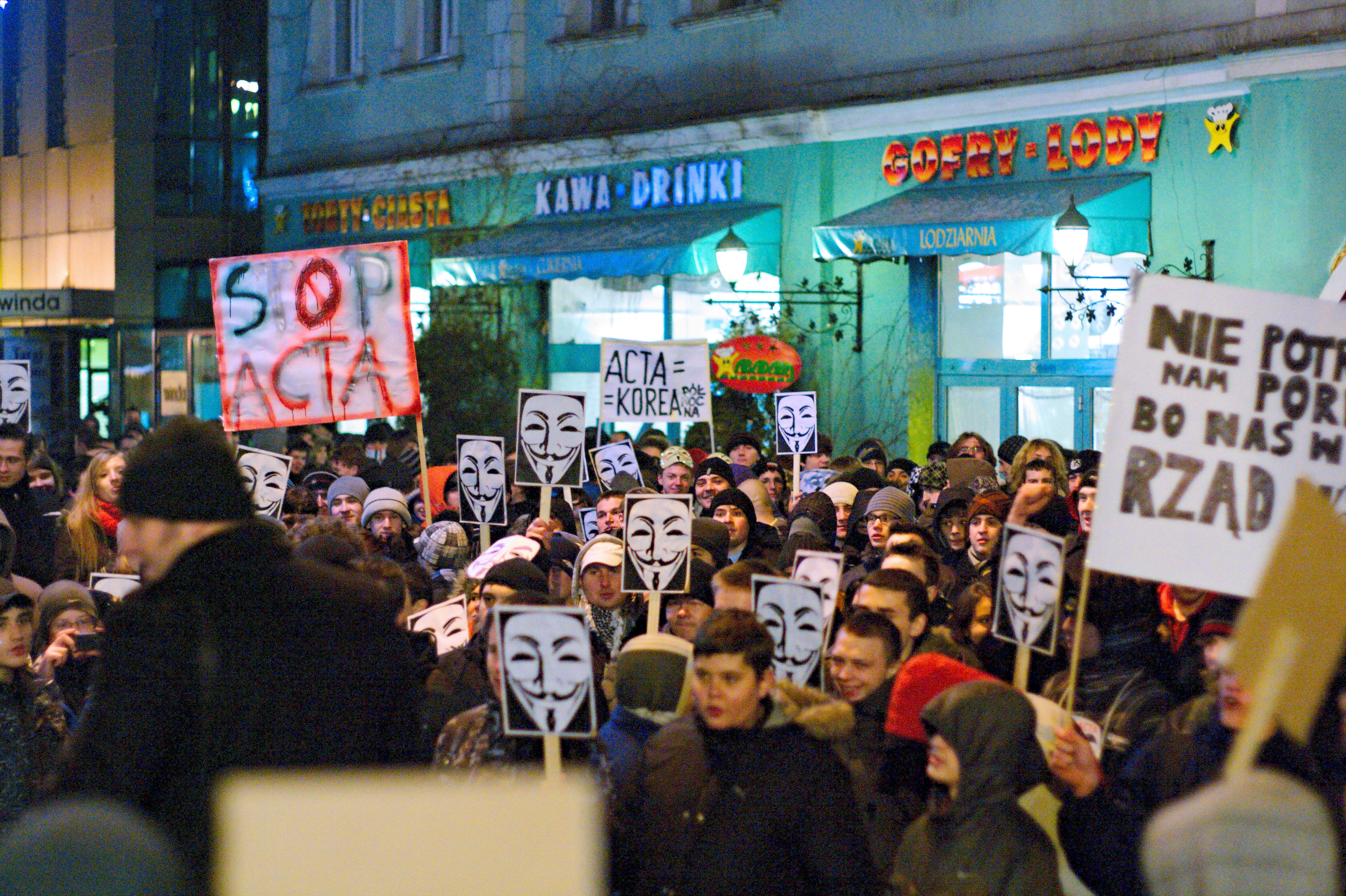 Anti Acta Protest in Poland